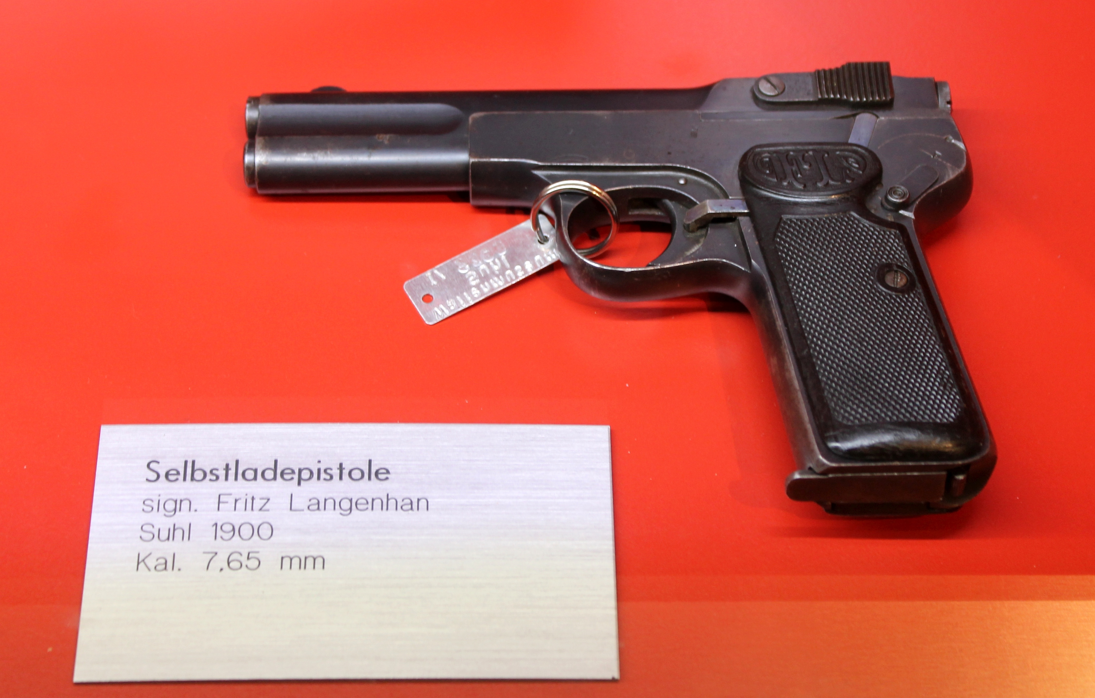 Langenhan-Armee-Pistole (F.L. Selbstlader Cal. 7,65) im Waffenmuseum Suhl.